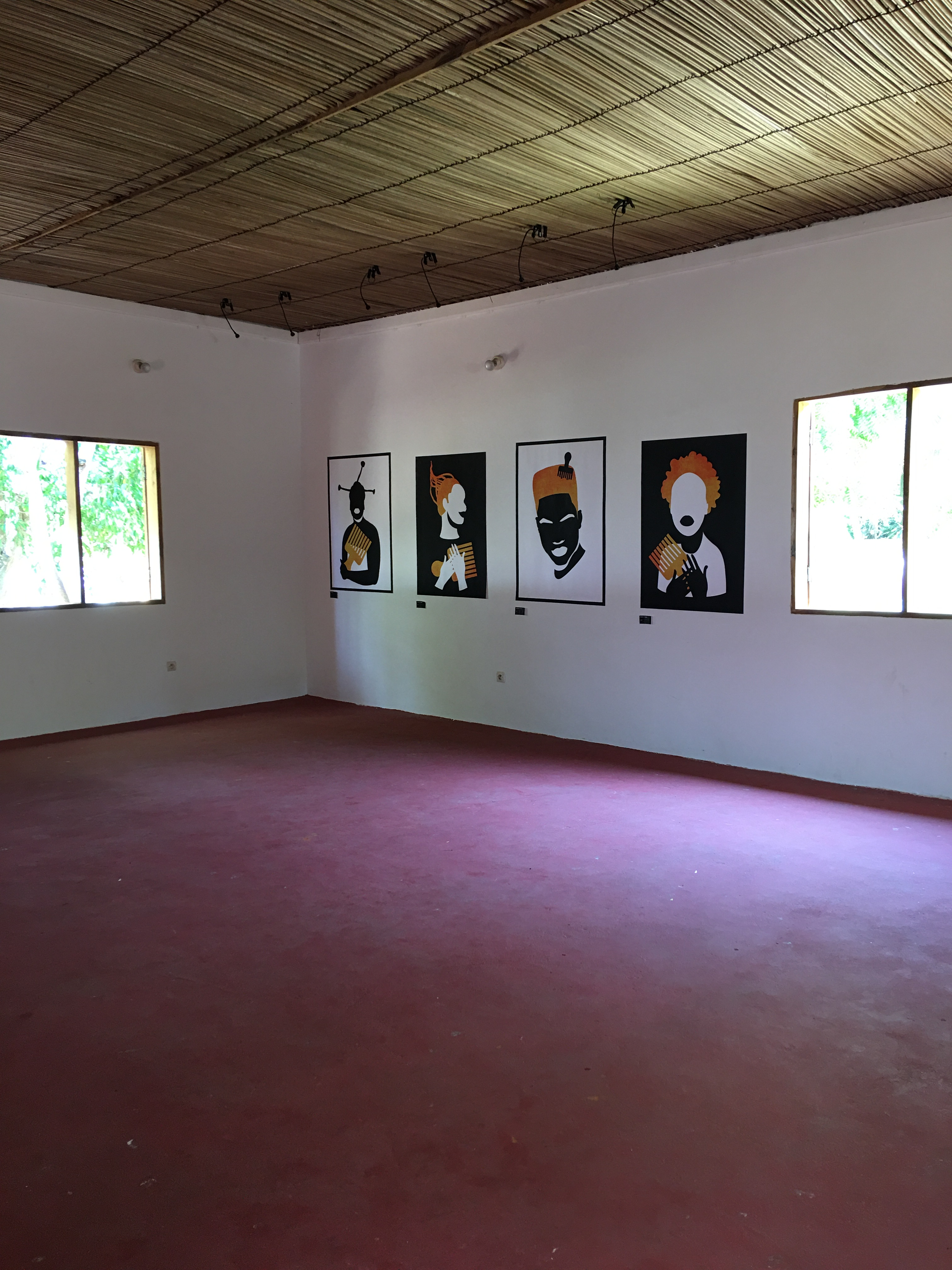 Exposition photo de l'artiste Mounia Youssef à la villa Karo de Grand-Popo